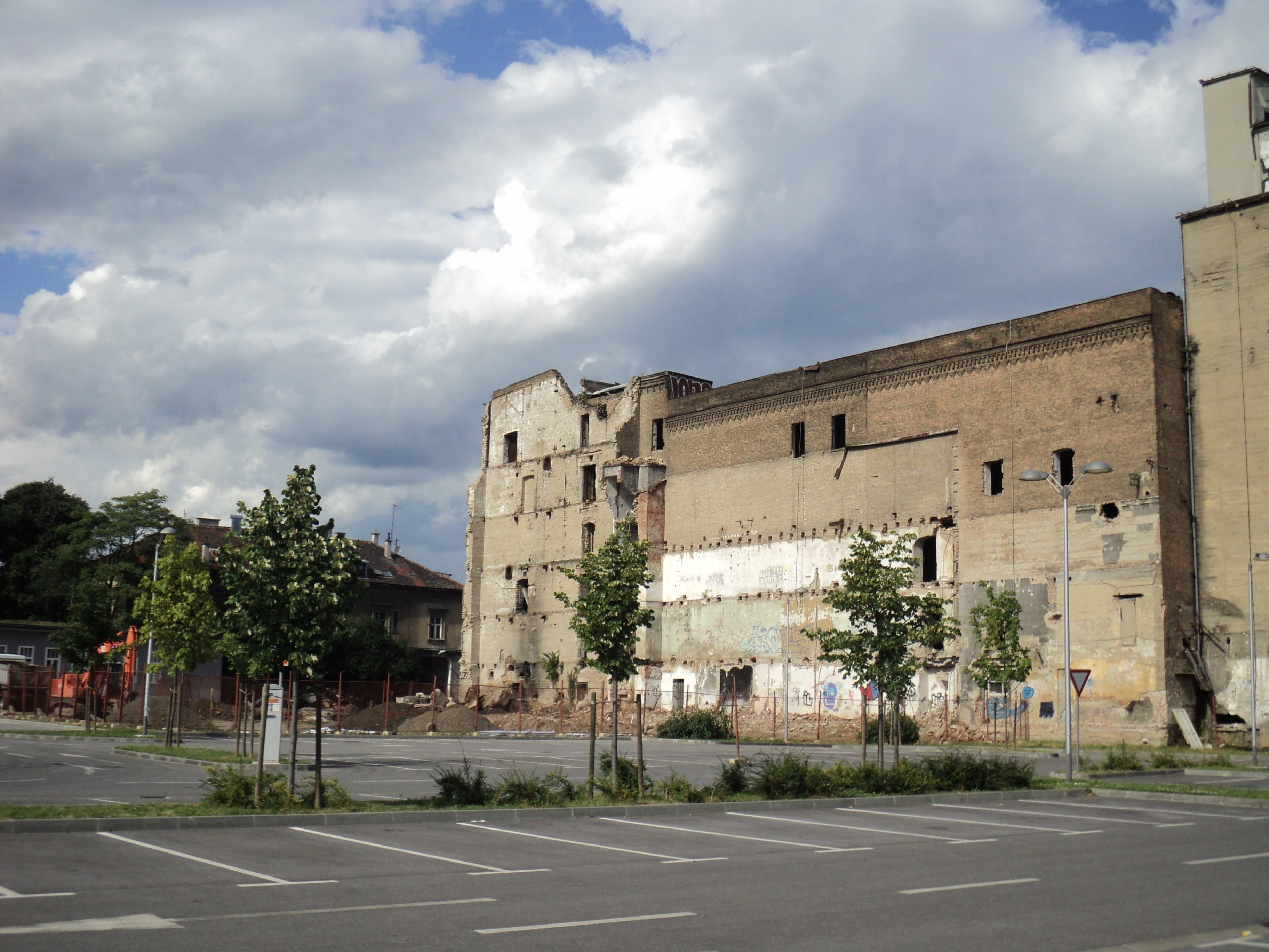 Zagrebački Paromlin, stanje 12. srpnja 2014., nakon rušenja dimnjaka i okolnih popratnih građevina.